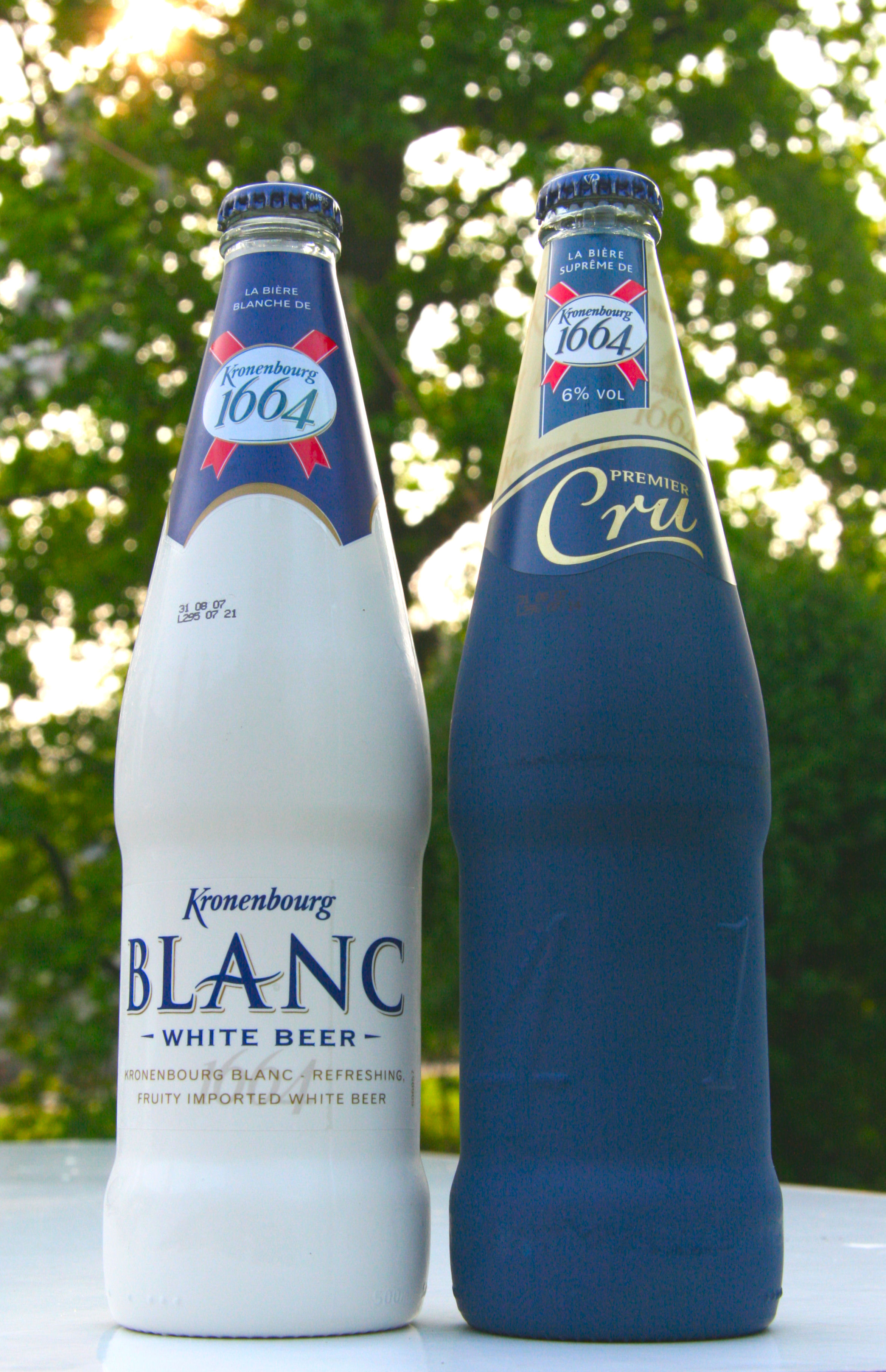 Beer